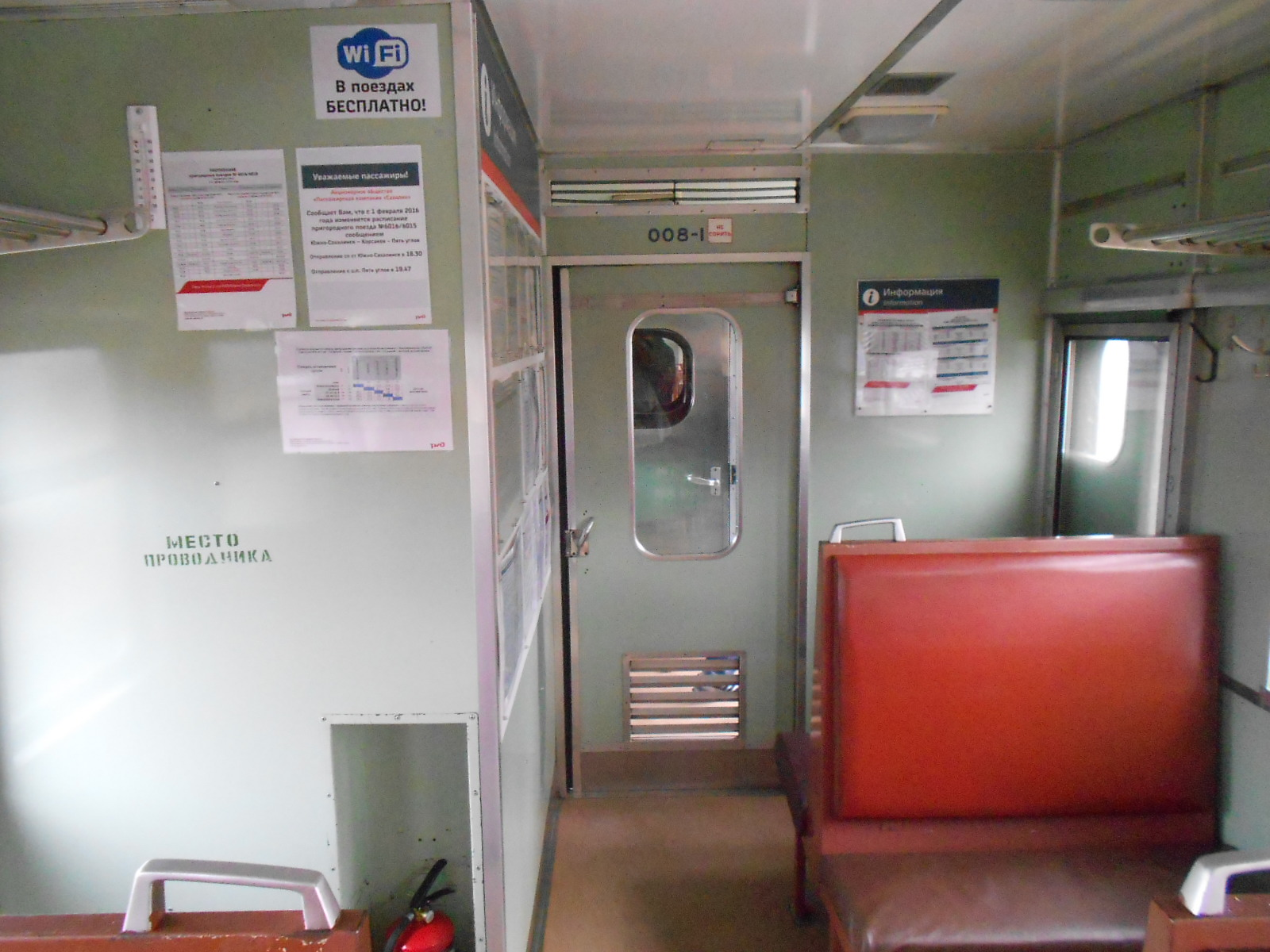 Салон дизель-поезда Д2